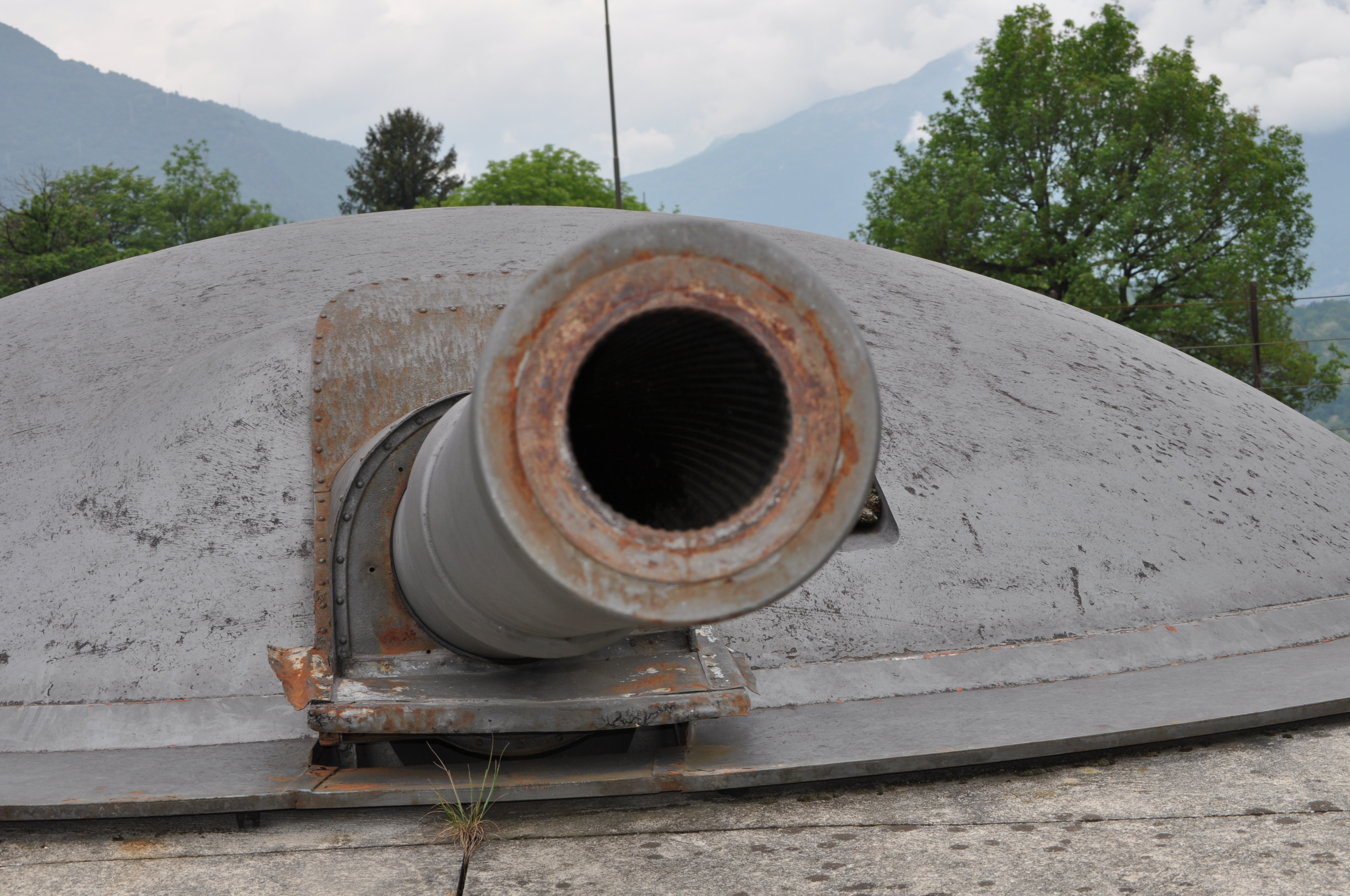 Vista anteriore di uno dei pezzi in cupola di Forte Montecchio